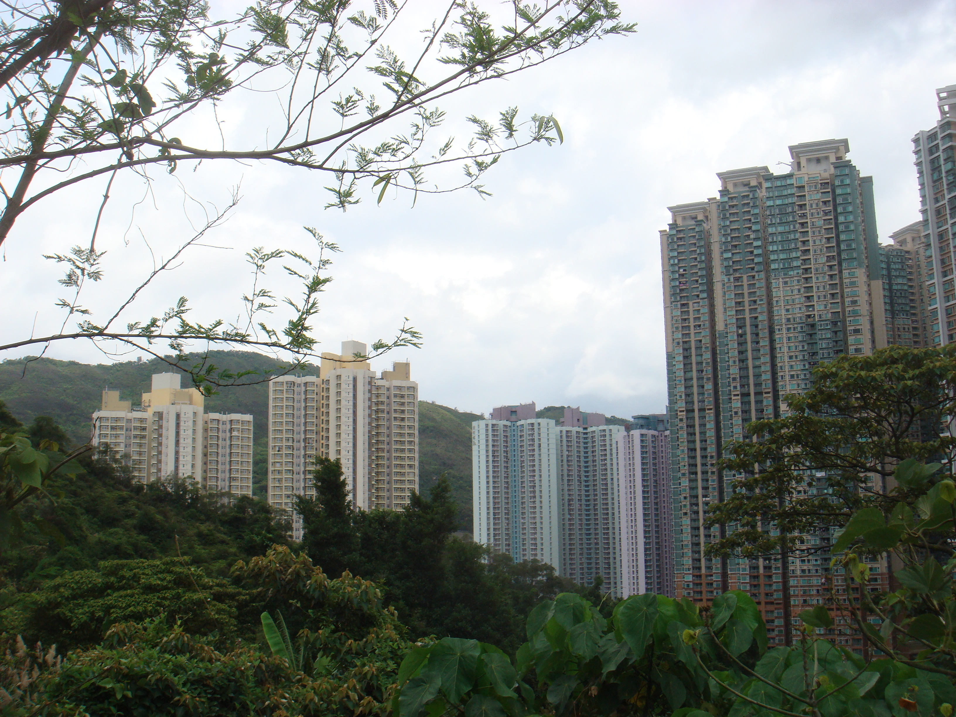 從澳景路眺望調景嶺